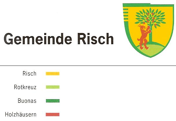 Altes Logo der Gemeinde Risch